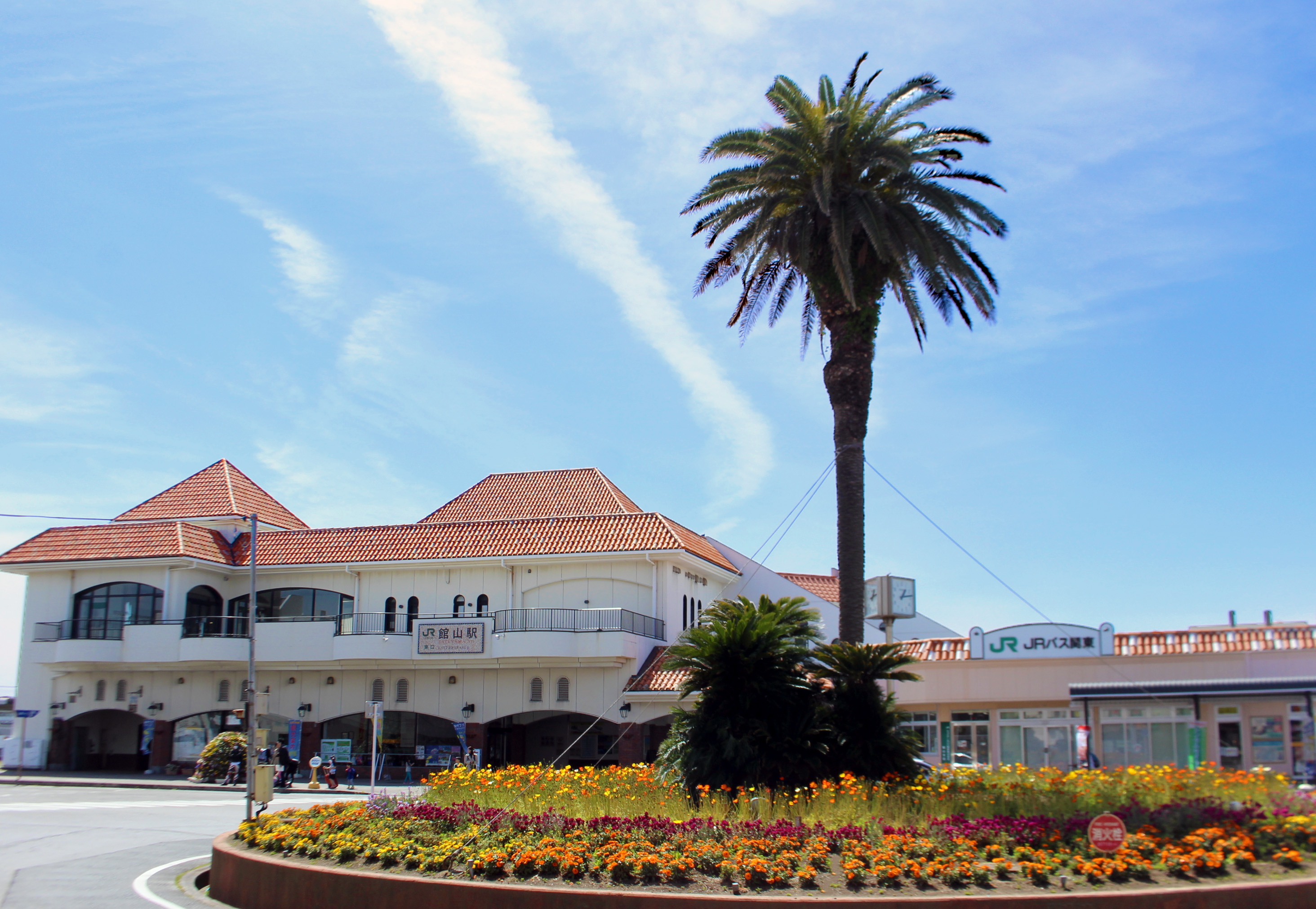 館山駅東口とロータリー（2019年4月26日撮影）